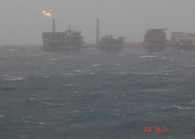 Cantarell RIGS